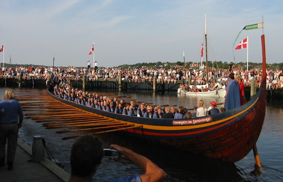 Havhingsten fra Glendalough på jungfrufärd. Från sjösättningen av det 60 åror och 30 m långa långskeppet som byggts på Roskide museum.